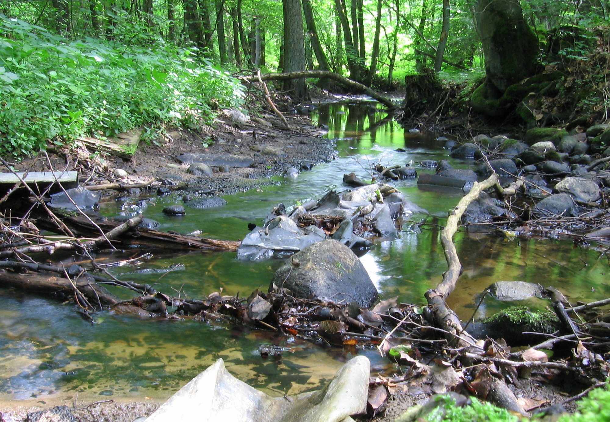 Zaśmiecona Rega na południe od drogi Rycerzewko-Kapice